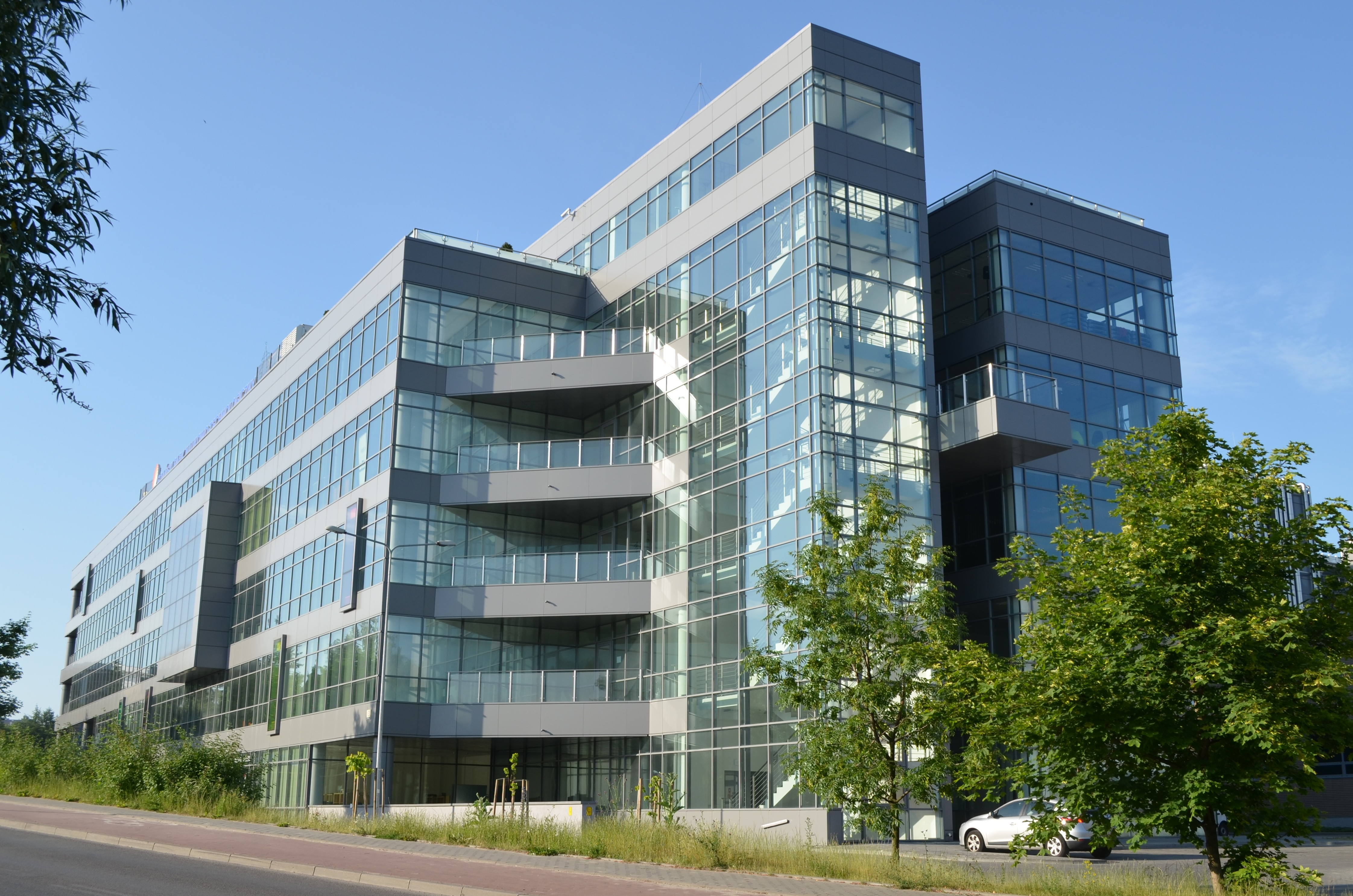 Jeden z trzech budynków GPN-T w Gdańsku